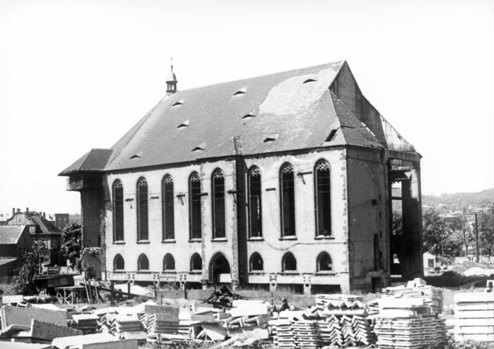 Dekanalkirche in Most (Brüx) nach dem Transport.